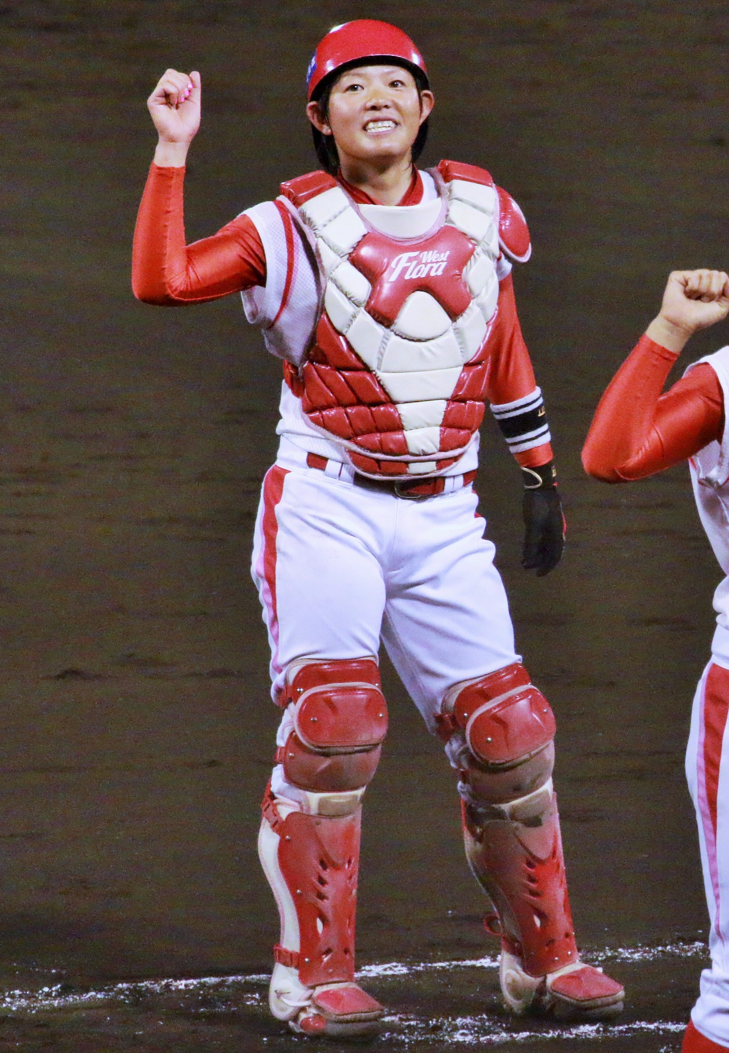 ウエストフローラ中村茜